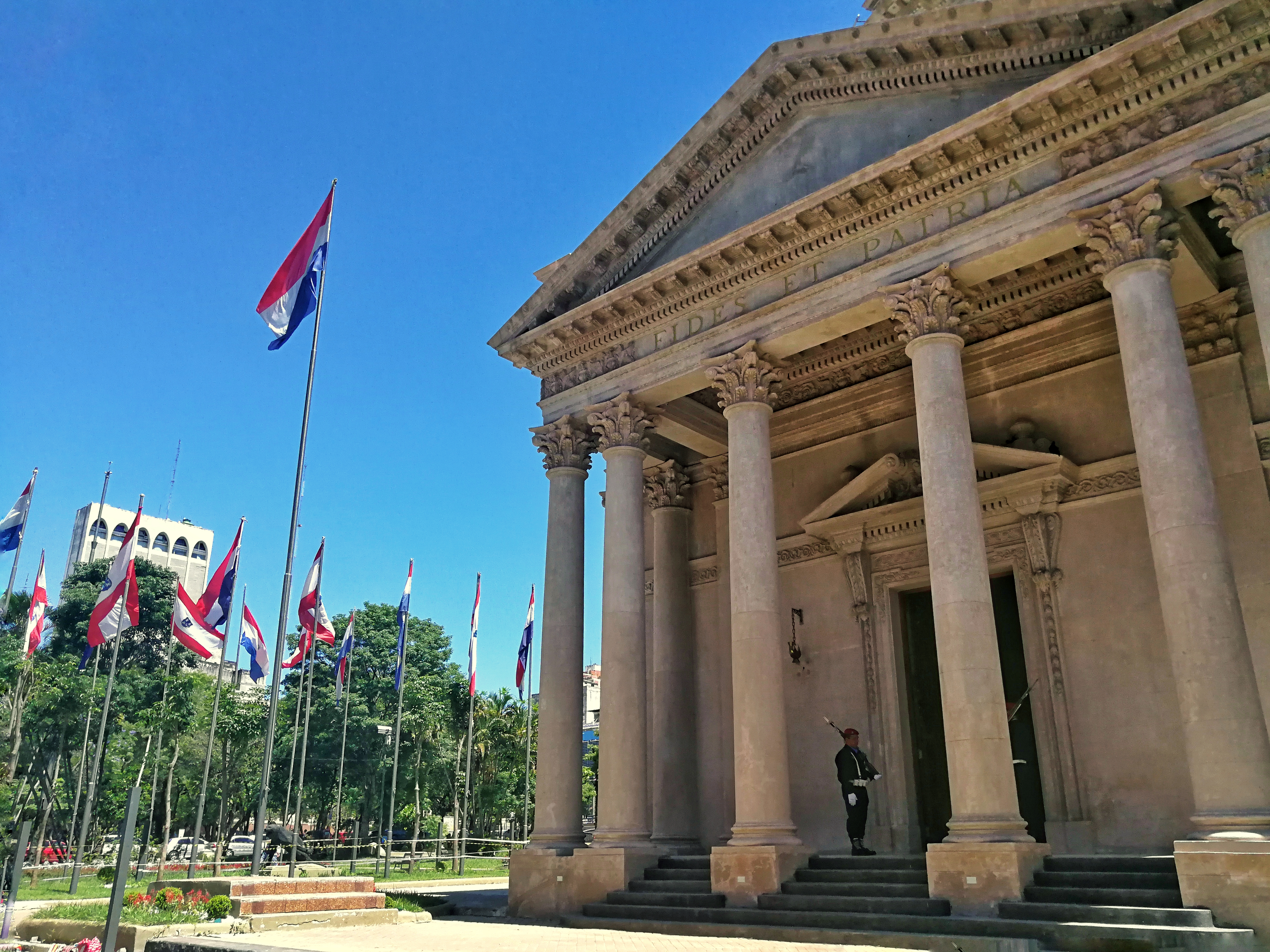 Panteón de los Héroes en centro histórico de Asunción.